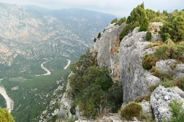 Vistas del Río Monelón desde la Loma de Benafigos